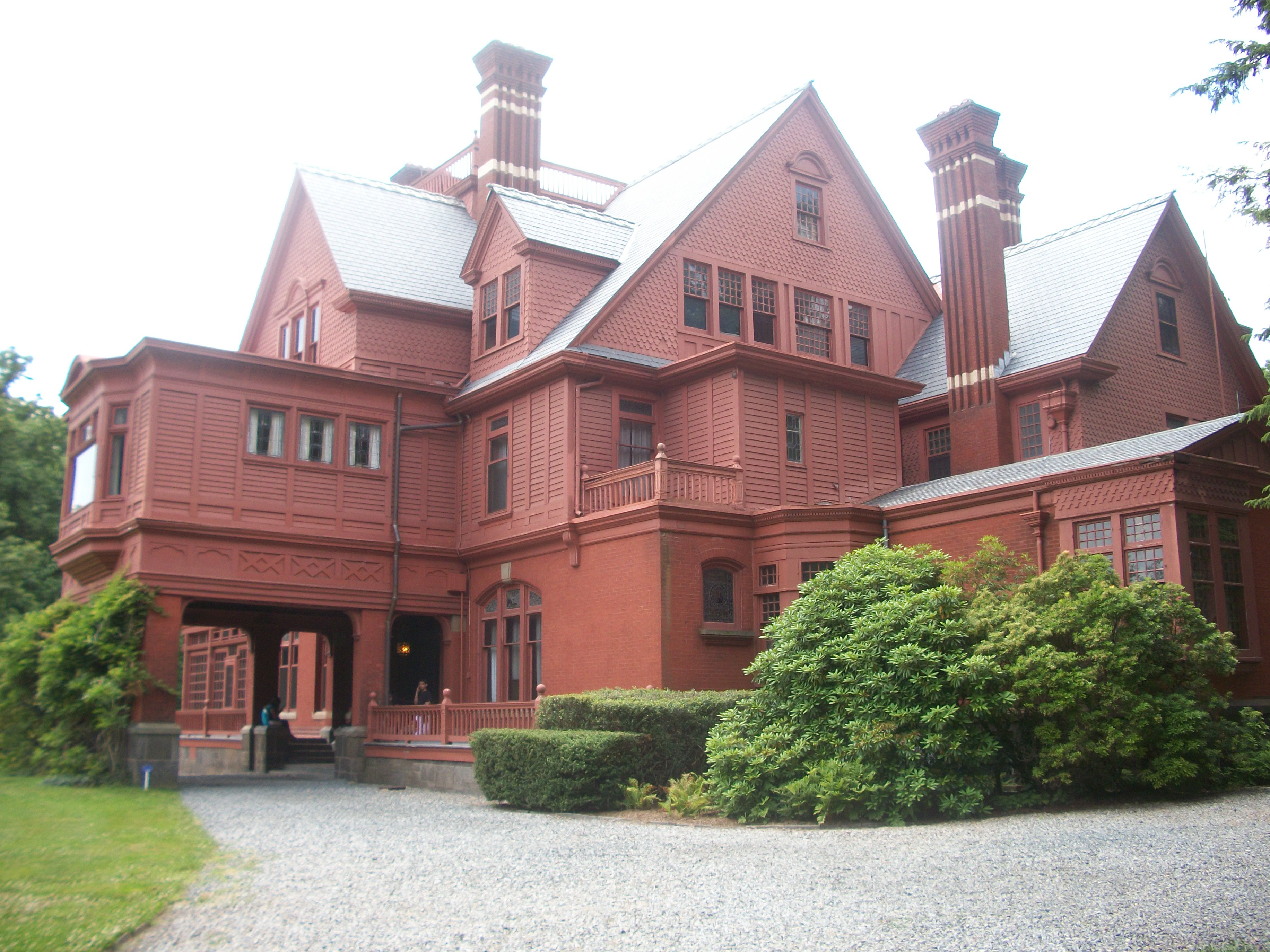 Glenmont, Edison's estate.